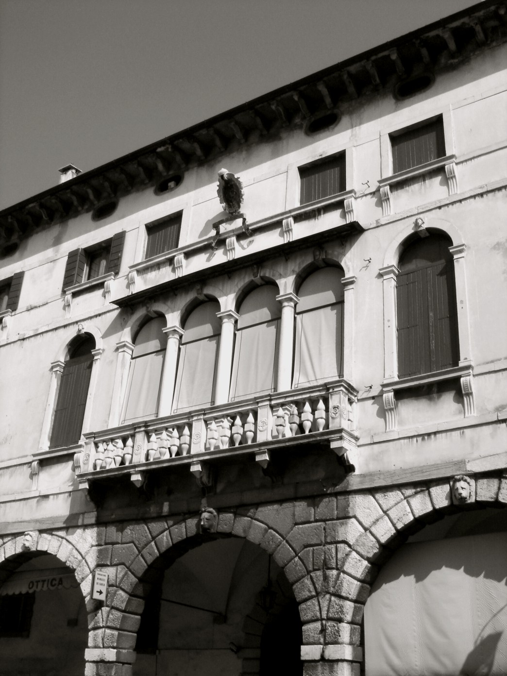 Serravalle di Vittorio Veneto (Treviso): Palazzo Minucci poi De Carlo, XVI secolo, particolare della facciata.